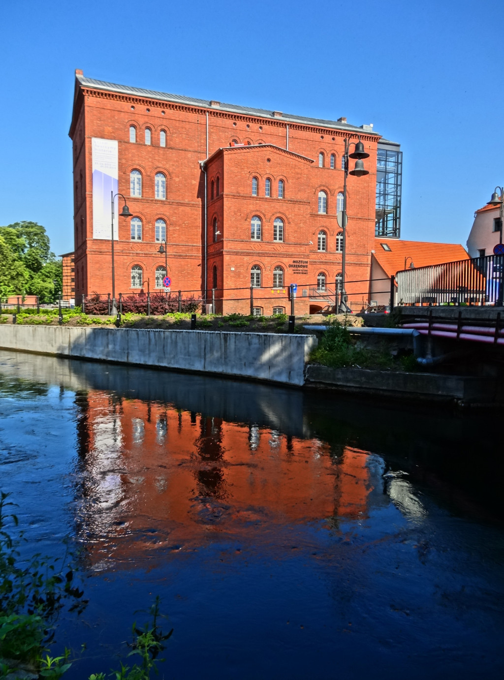 Czerwony Spichlerz na Wyspie Młyńskiej w Bydgoszczy; dawny młyn Camphausena z 1861 r., od 2009 r. mieści galerię sztuki nowoczesnej